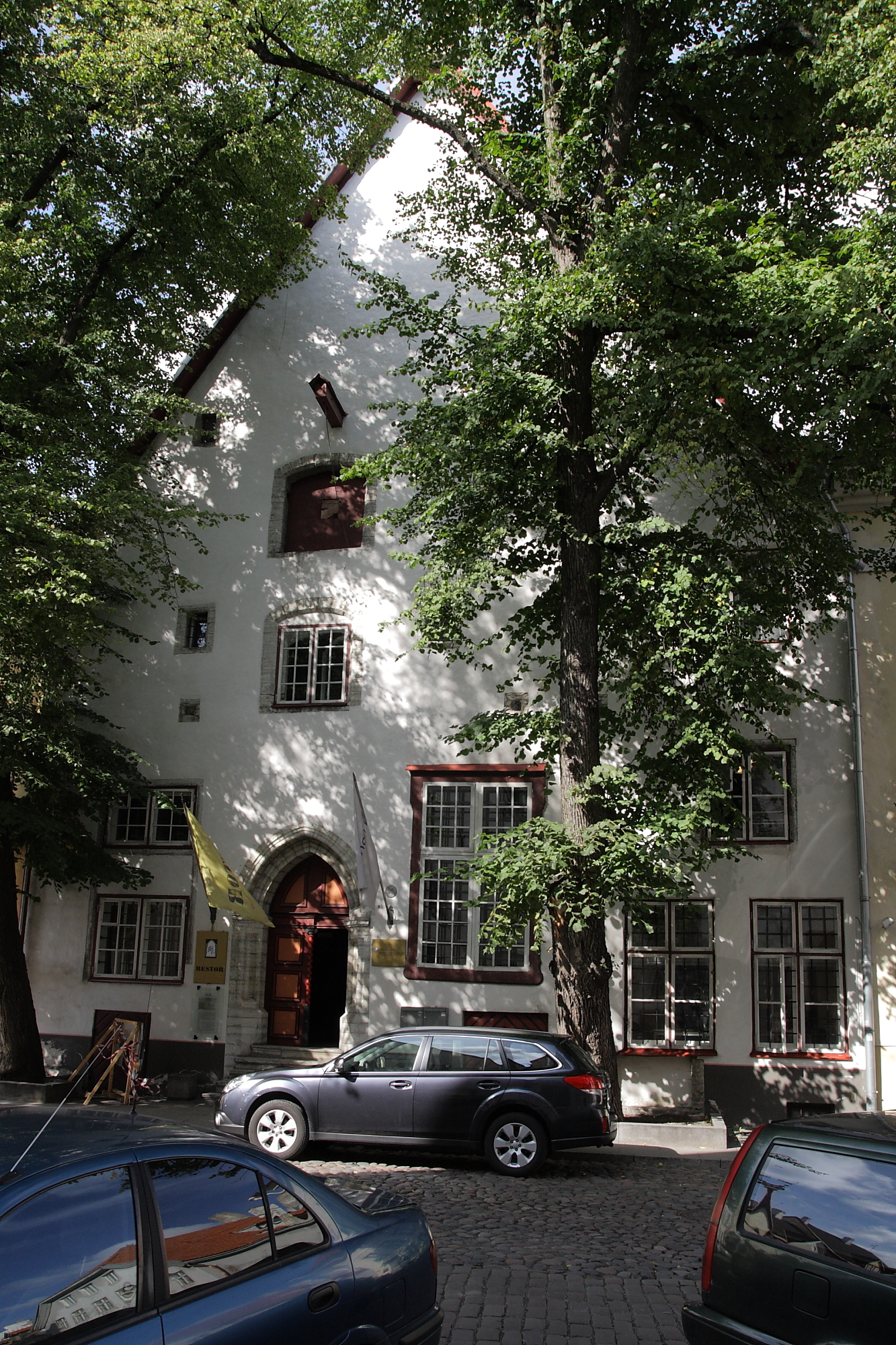 Tallinn, elamu Lai 29 väravahoonega, 15.saj., 18.saj., 20.saj